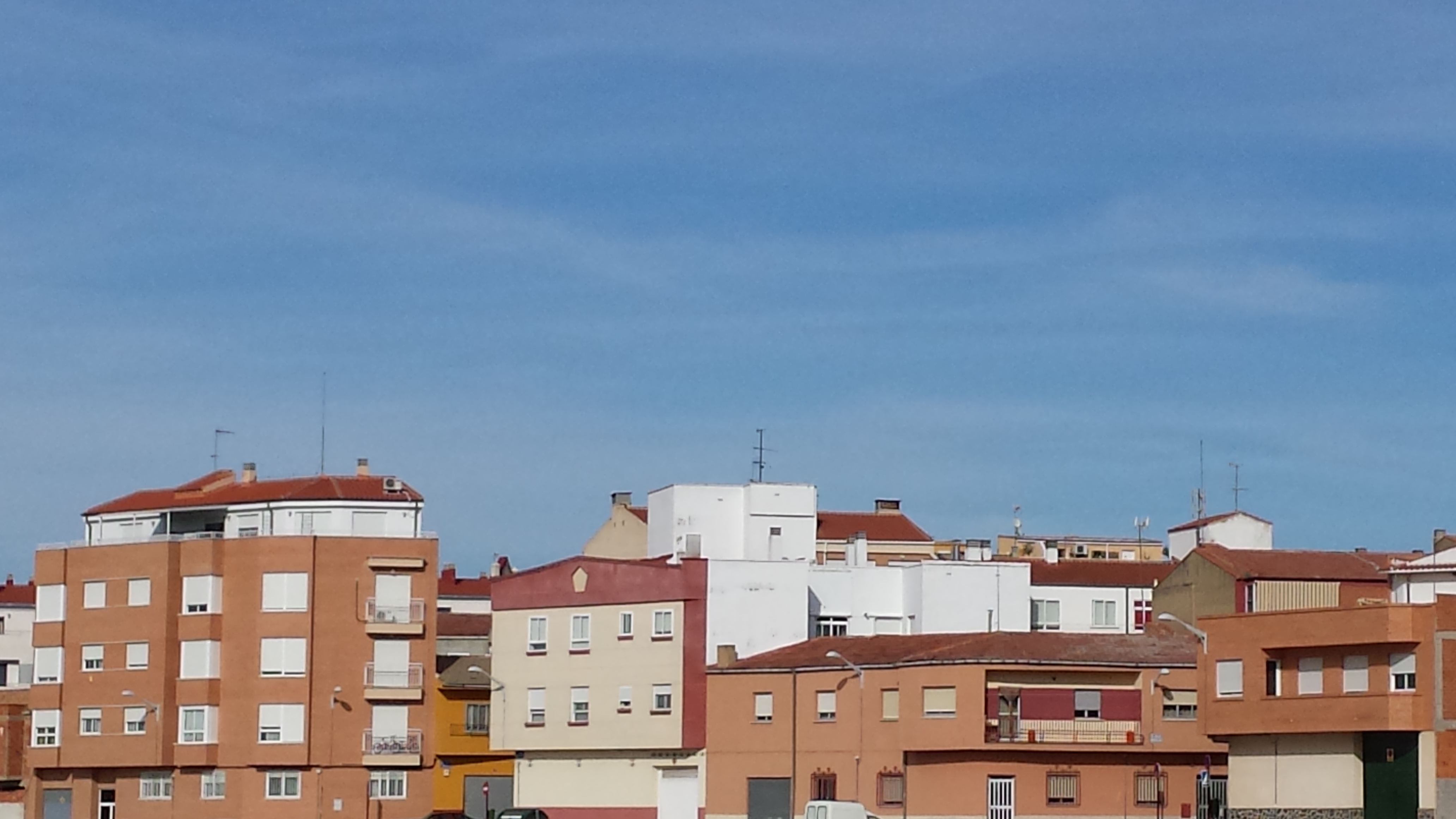 Barrio San Pedro-Mortero. Albacete